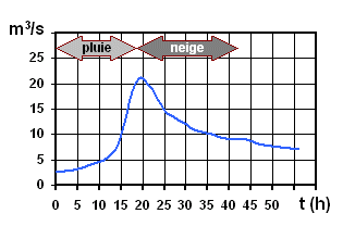 Graphe : crue de la rivière La Savoureuse (Territoire de Belfort) des 3 et 4 mars 2006 à Belfort Données issue du site Tracé par F5ZV le 06/03/2006